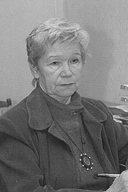 Лауреаты Государственных премий Российской Федерации 2004 года: Кузьмина Нинель Николаевна